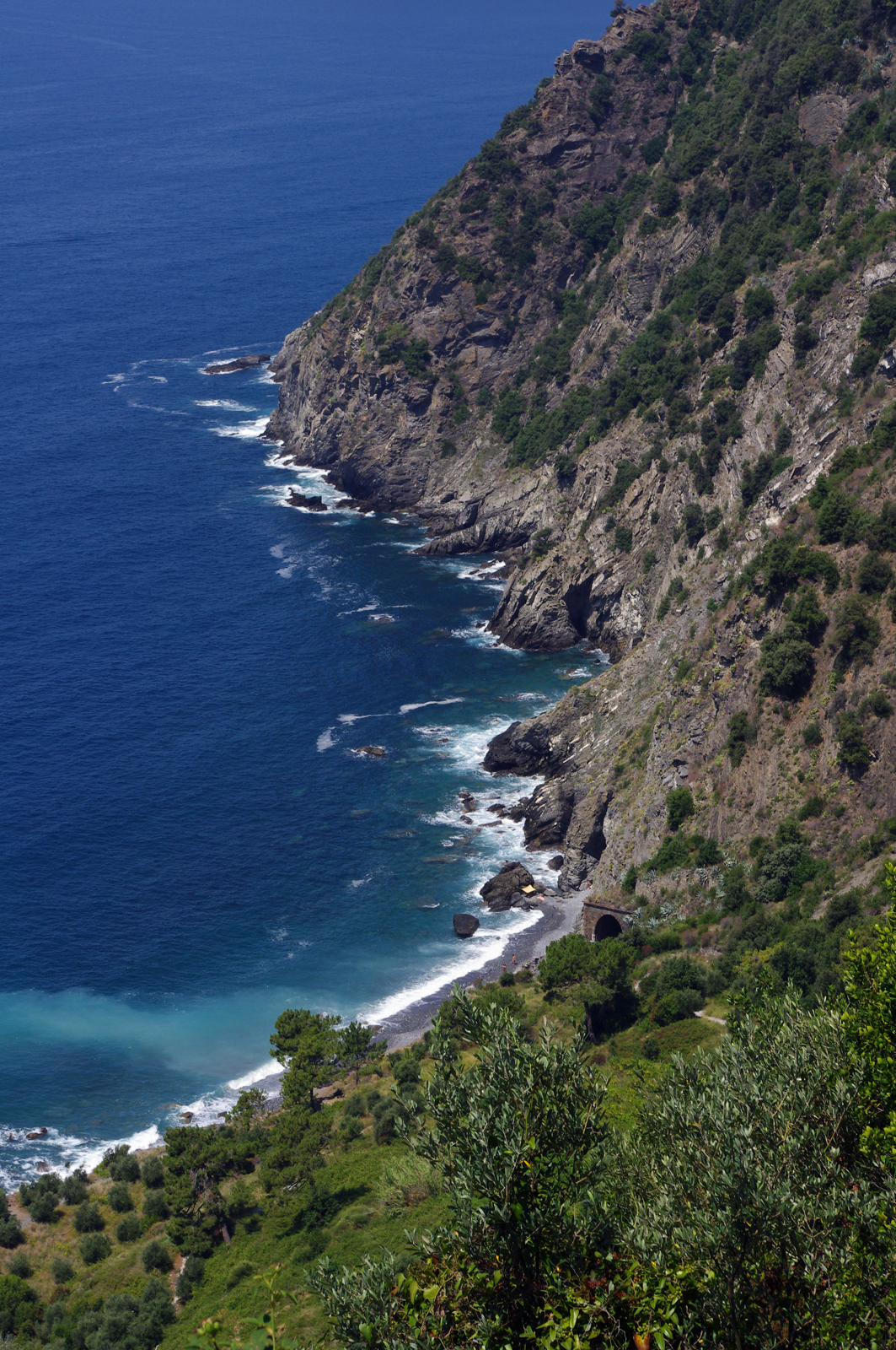 Cinque Terre Coast 2